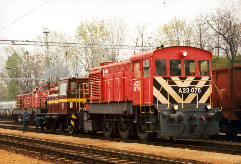 A23-as ipari pályaszámon nyilvántartott, MÁV sorozat szerint M31-es dízelmozdony.